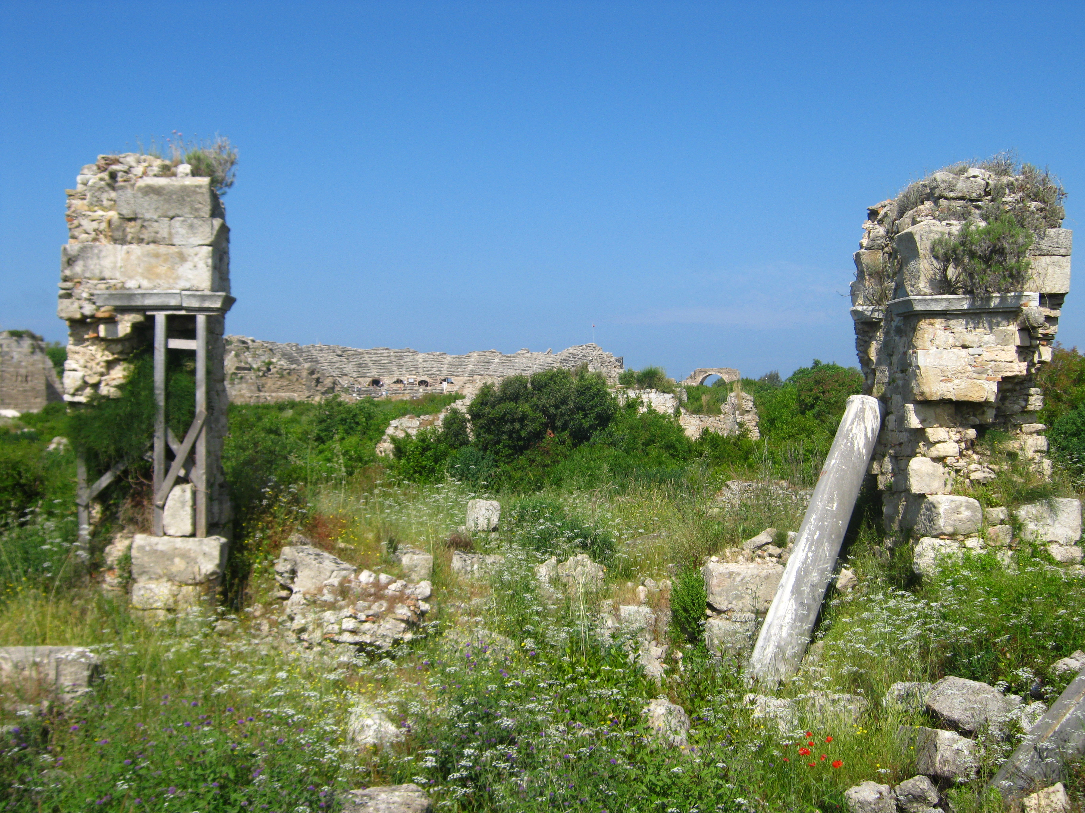 Храм "ЕЕ". Загальний вигляд руїн зі Сходу